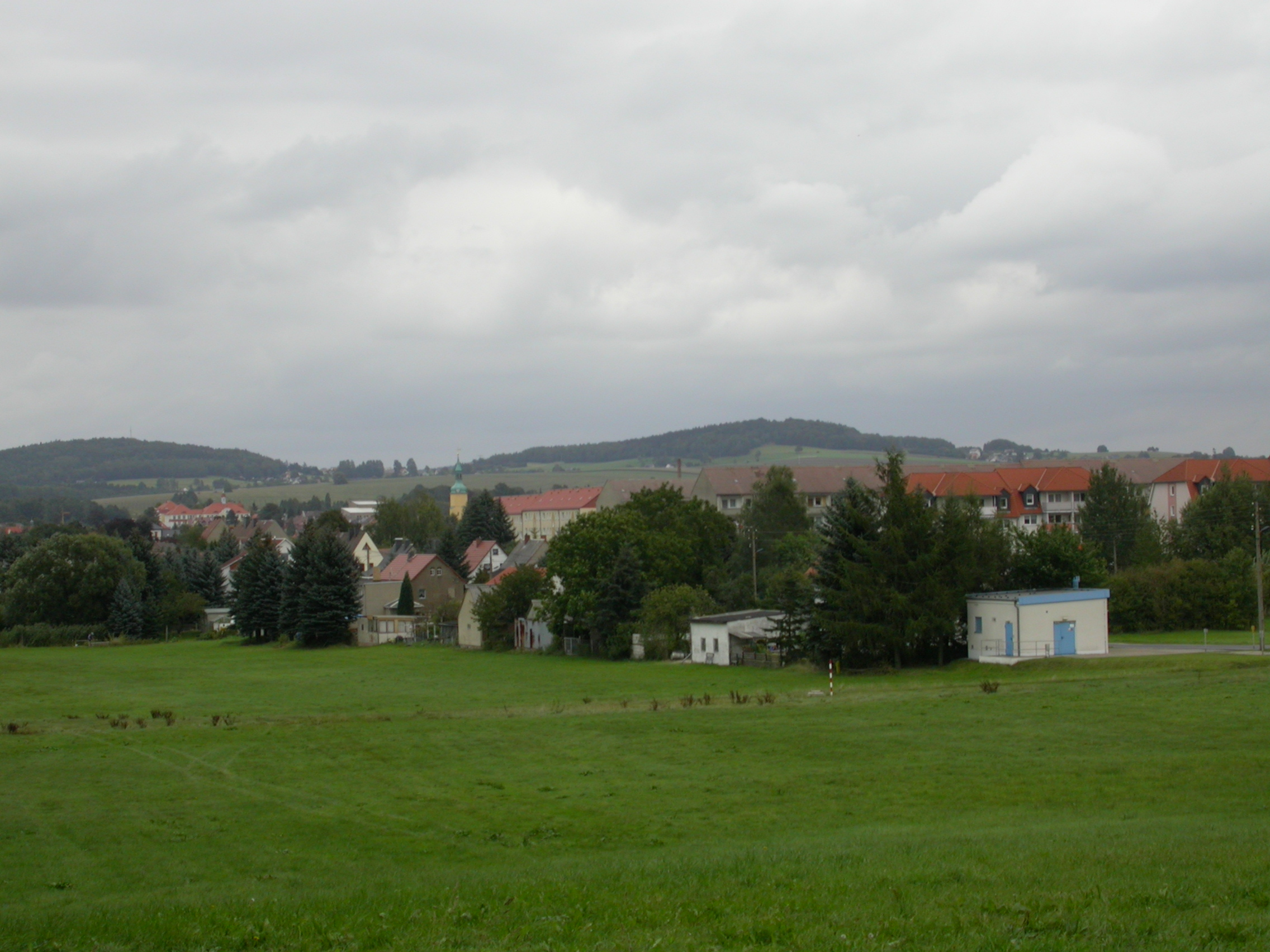 Pulsnitz